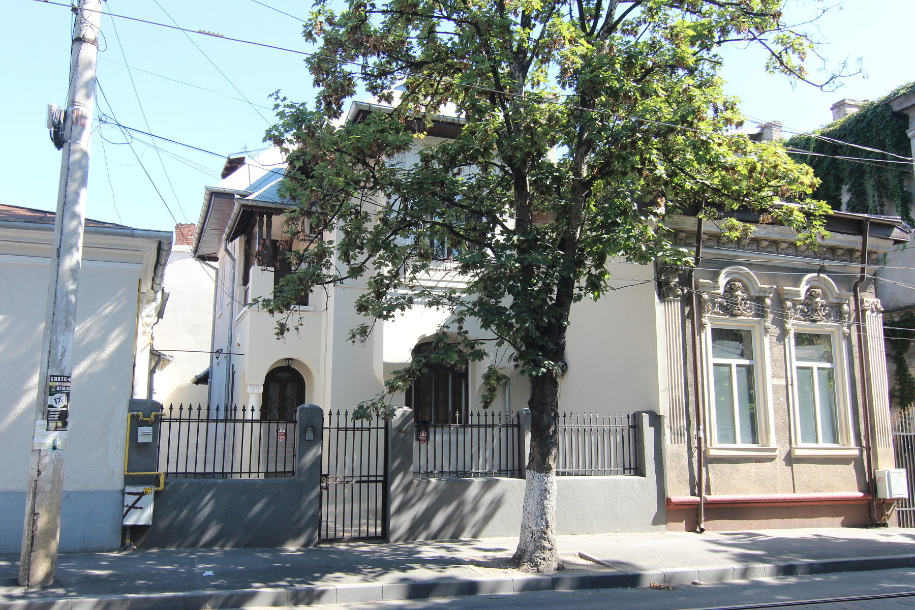 Casă pe strada Traian